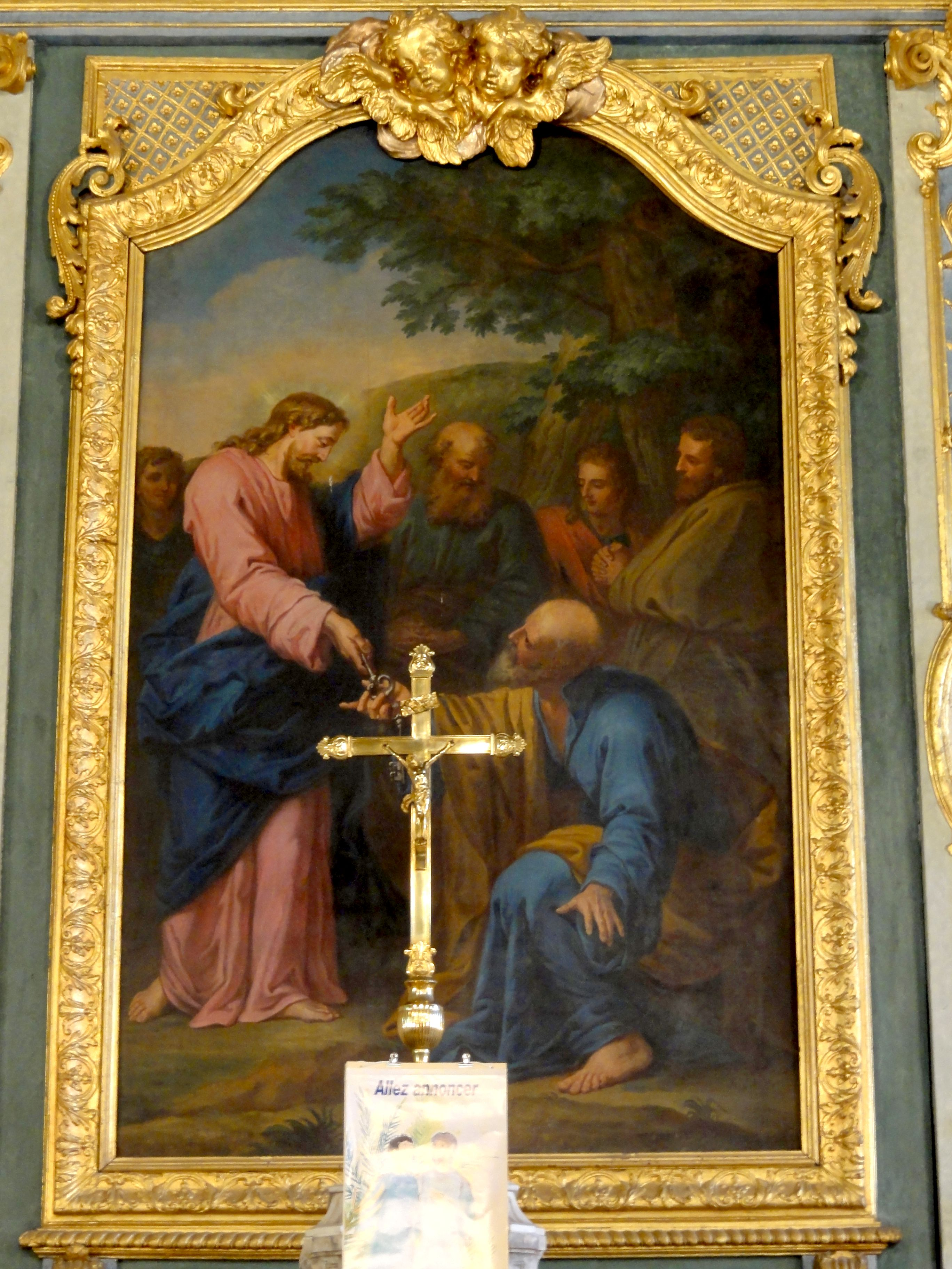 Tableau de retable - La Remise des clés à Saint Pierre, en présence de Saint Paul.